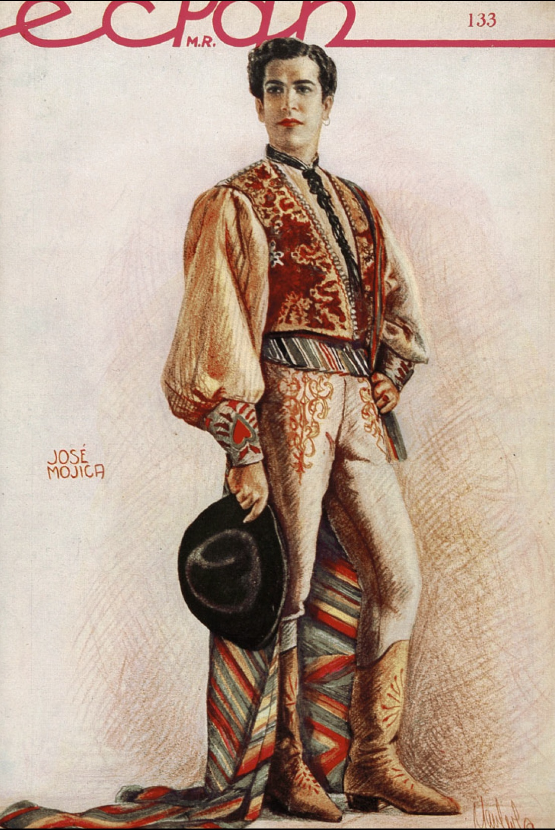 Dibujo del actor, tenor y sacerdote mexicano José Mojica. Portada de la revista chilena Ecran N°133 hecha por el dibujante chileno Raúl Manteola.